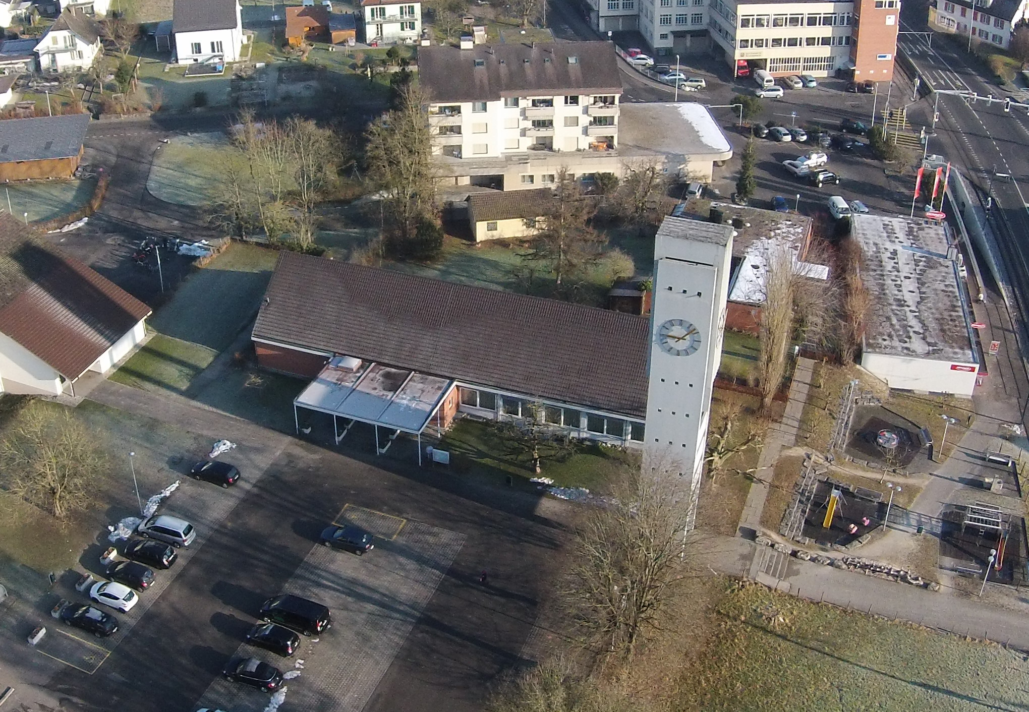 Reformierte Kirche Unterentfelden